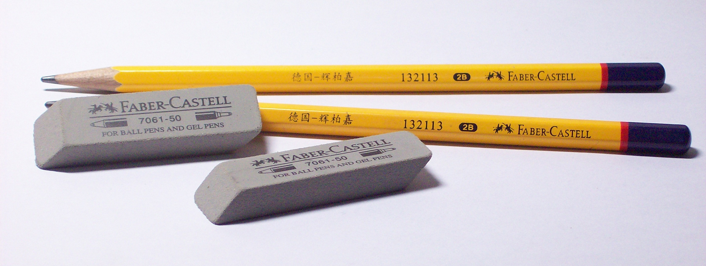 辉柏嘉（Faber-Castell）铅笔与橡皮